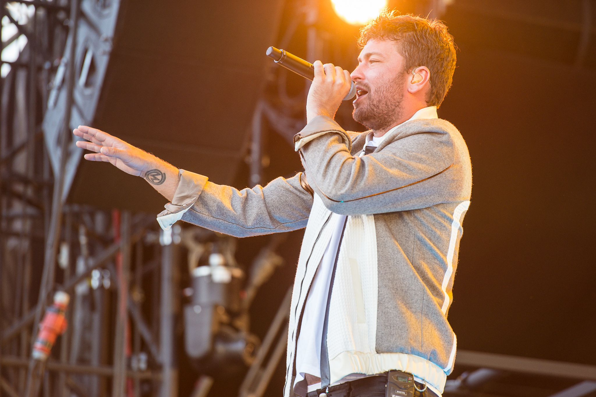 ARGO-Konzerte,Alternastage,Konzert,Livekonzert,Livemusik,Marteria,Musik,RiP,Rock im Park 2014